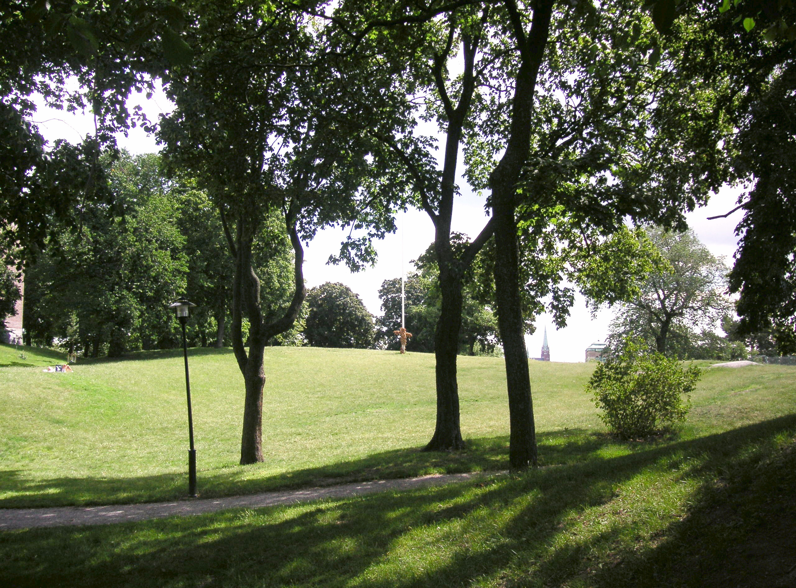 Vanadislunden i Stockholm